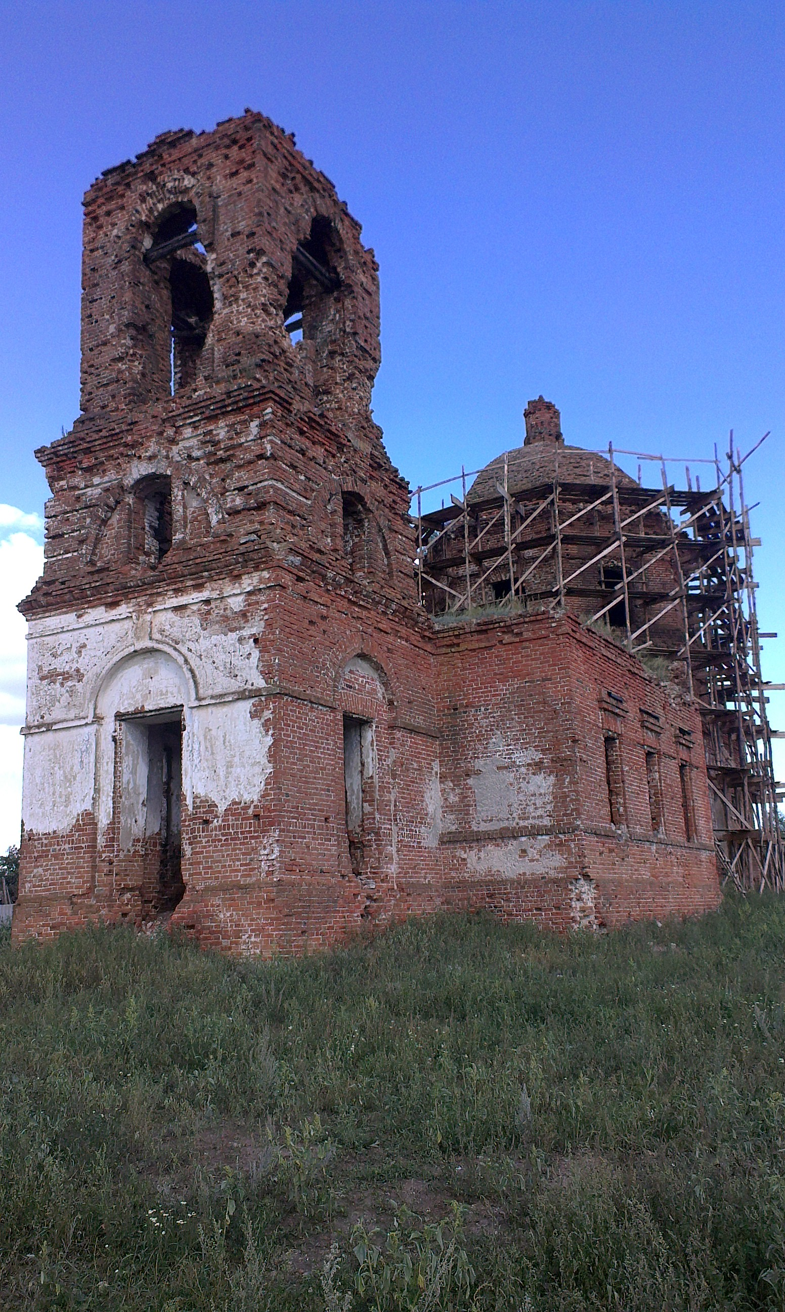 Колокольня Свято-Никольского храма с.Воронцовка